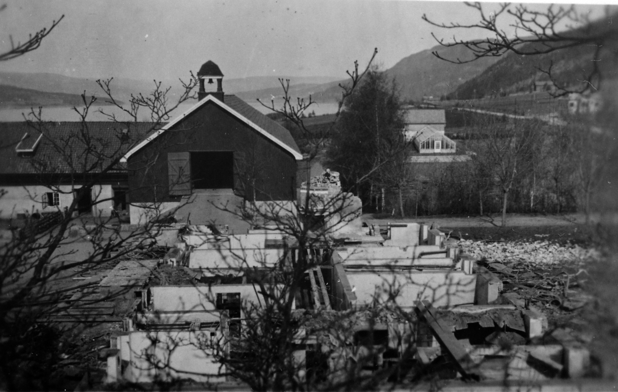 Skolebygningen på Vea nedbrent etter kampene i april 1940